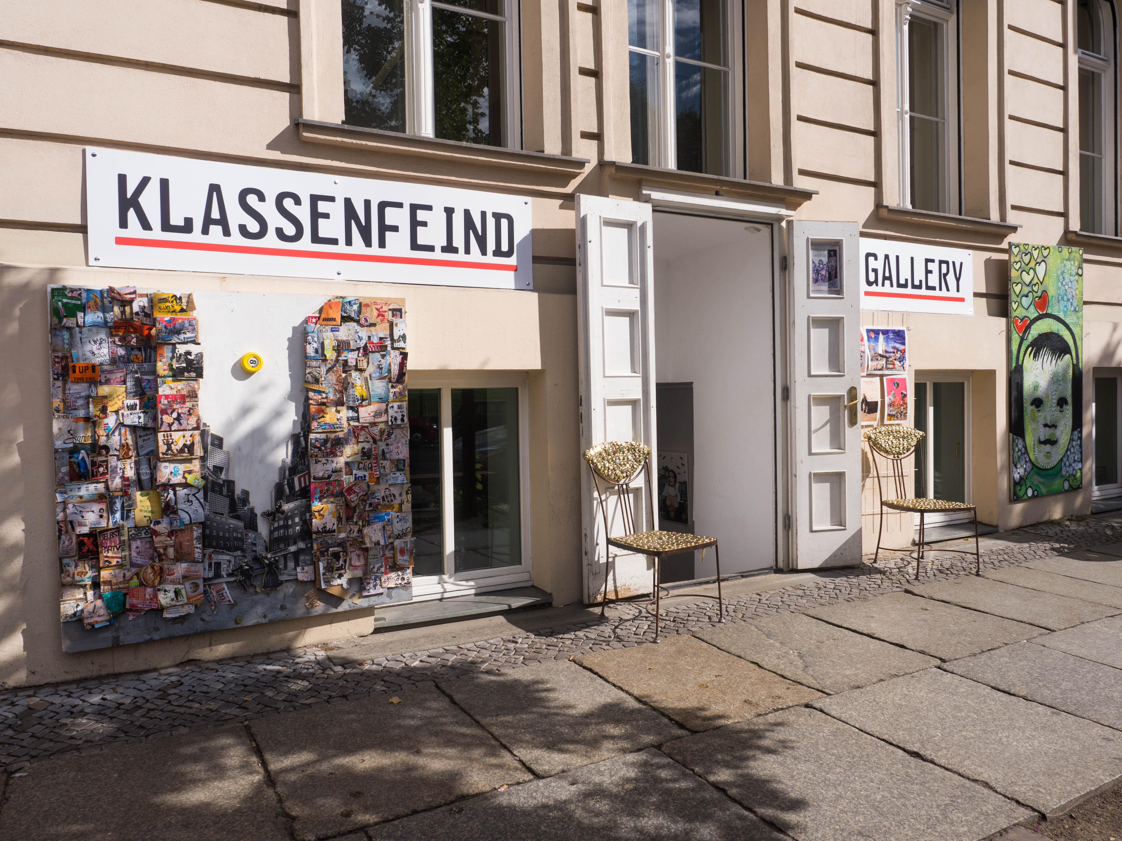 Galerie von außen; Oranienburger Str. 22, 10178 Berlin